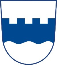 Libochovičky znak